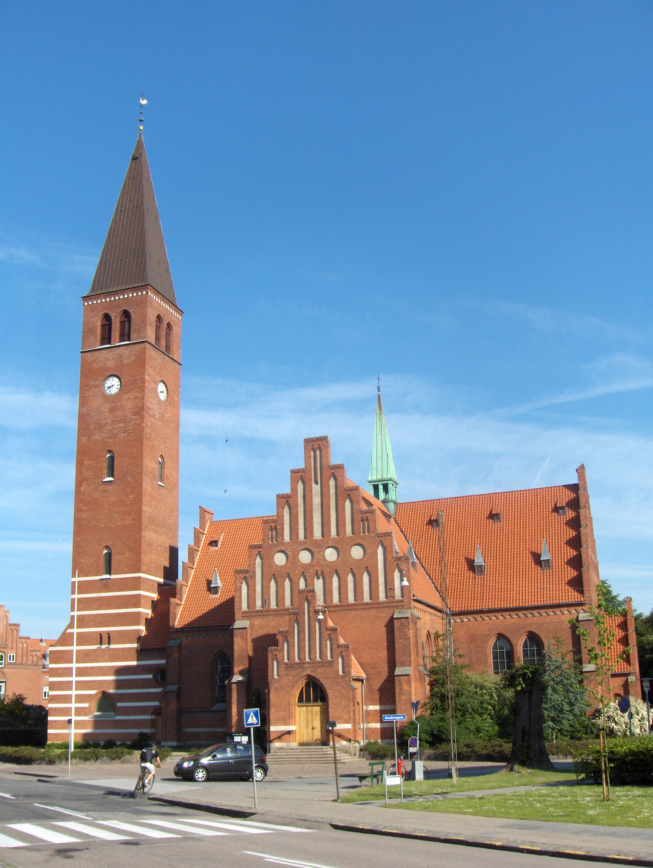 Vor Frelsers Kirke i Aalborg